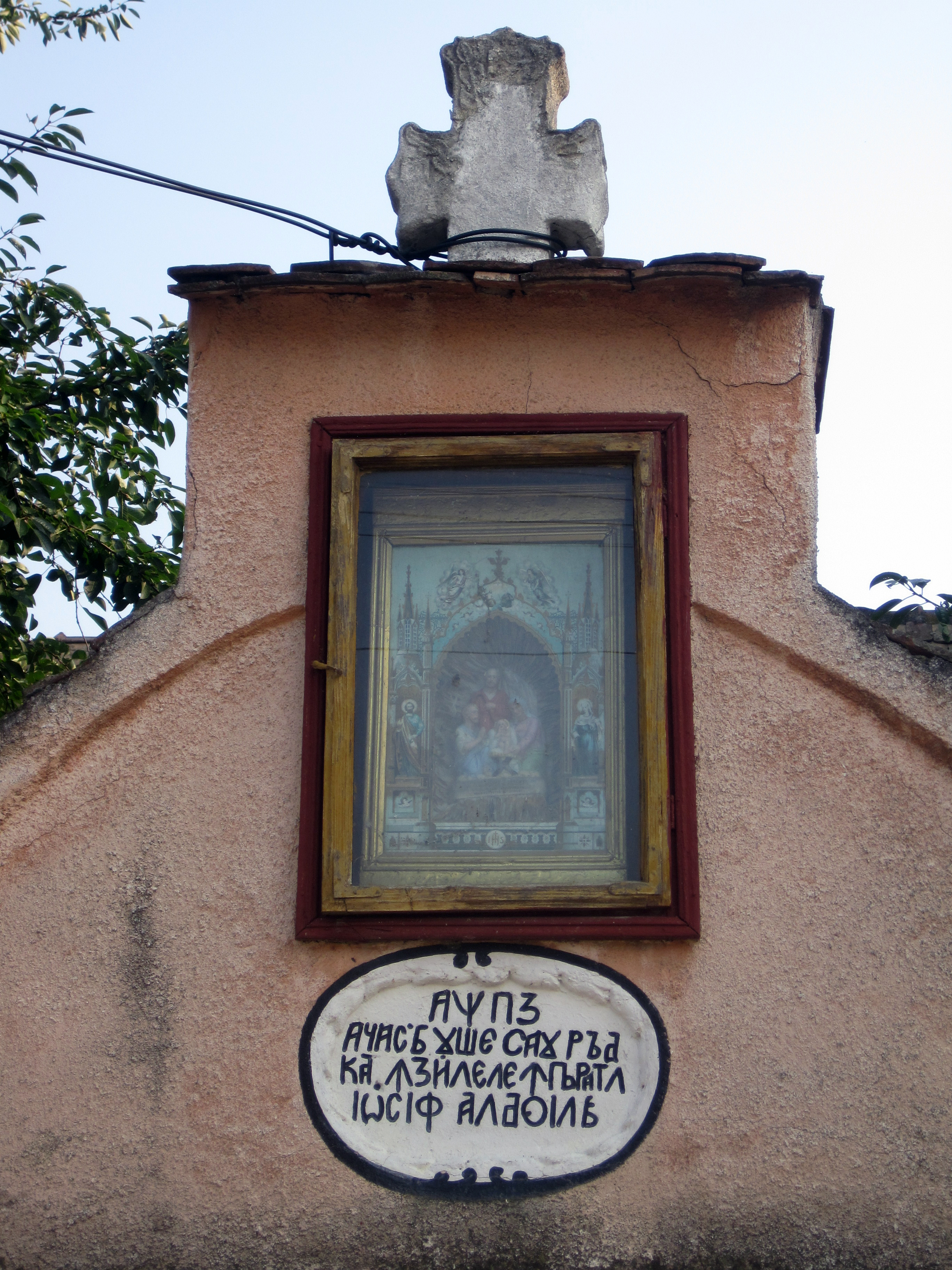 Biserica „Cuvioasa Paraschiva”